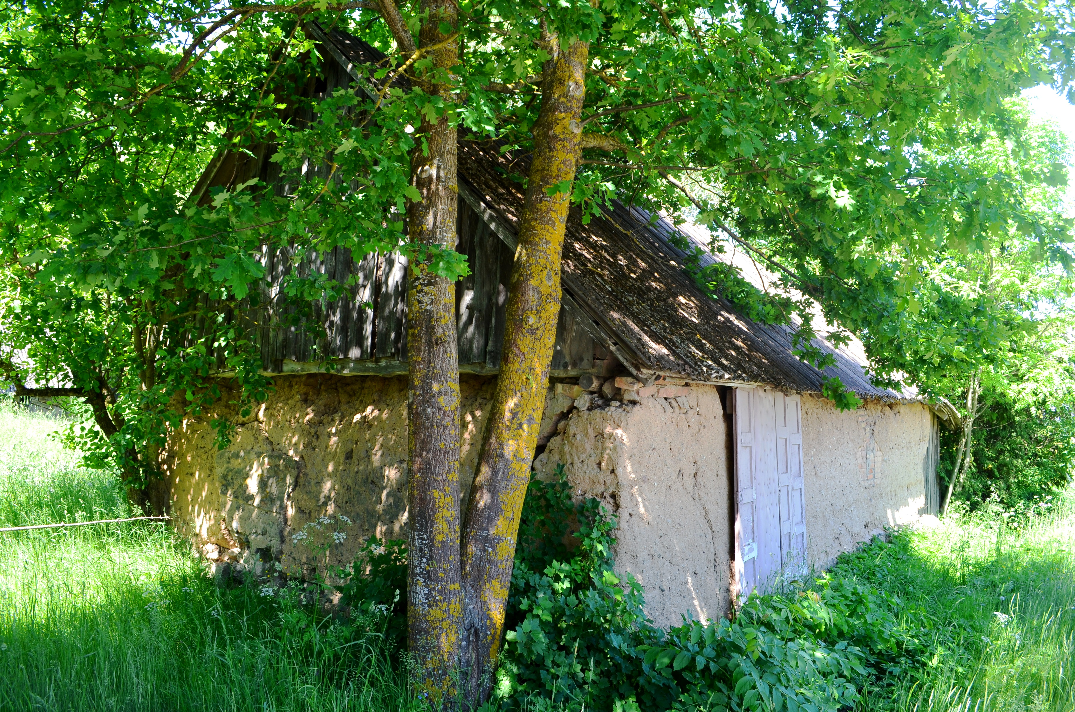 Senovinis moliu drėbtas tvartas Binėnuose, Pakruojo raj.